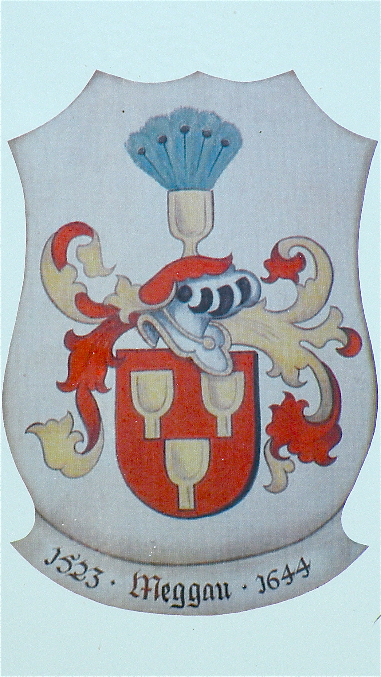 Wappen der Meggauer auf der Sonnenuhr der Burg Bad Kreuzen im Bezirk Perg in Oberösterreich